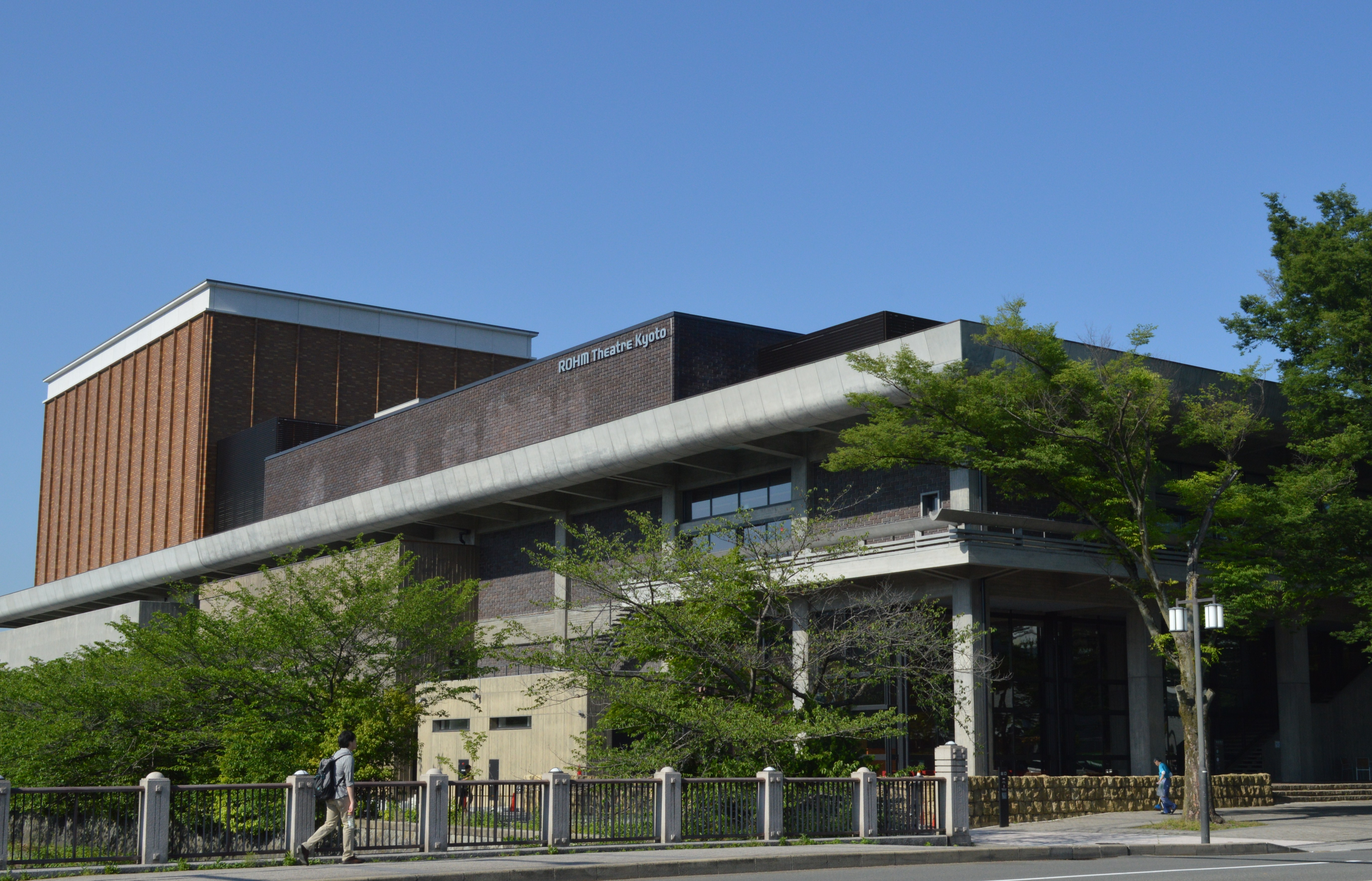 京都市左京区 京都会館（ロームシアター京都）